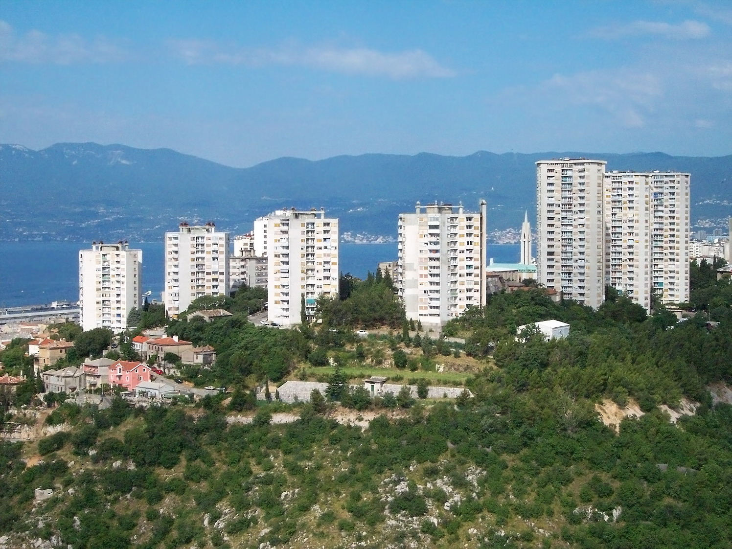 Rijeka (Croatia) Italian and Hungarian name: Fiume